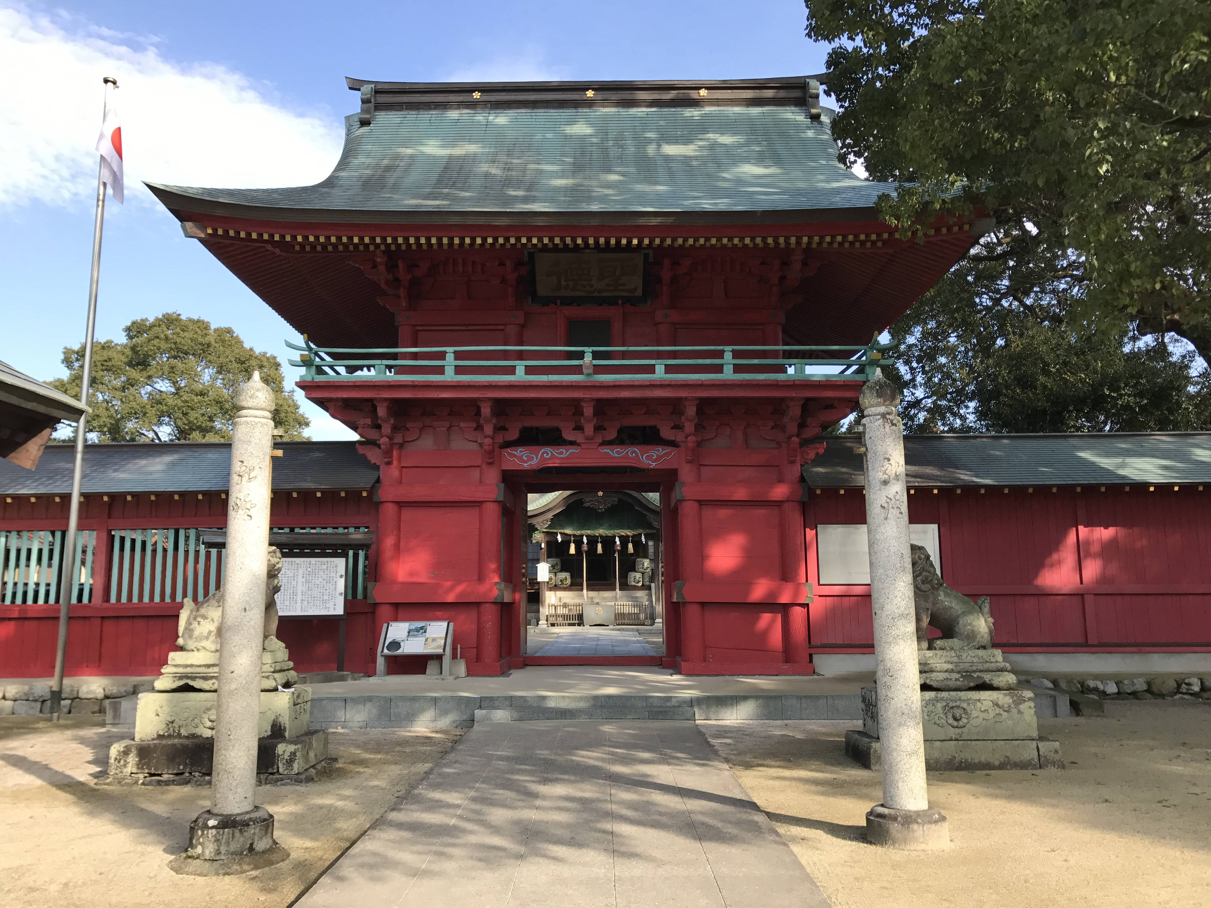 福岡県久留米市・北野天満宮の楼門